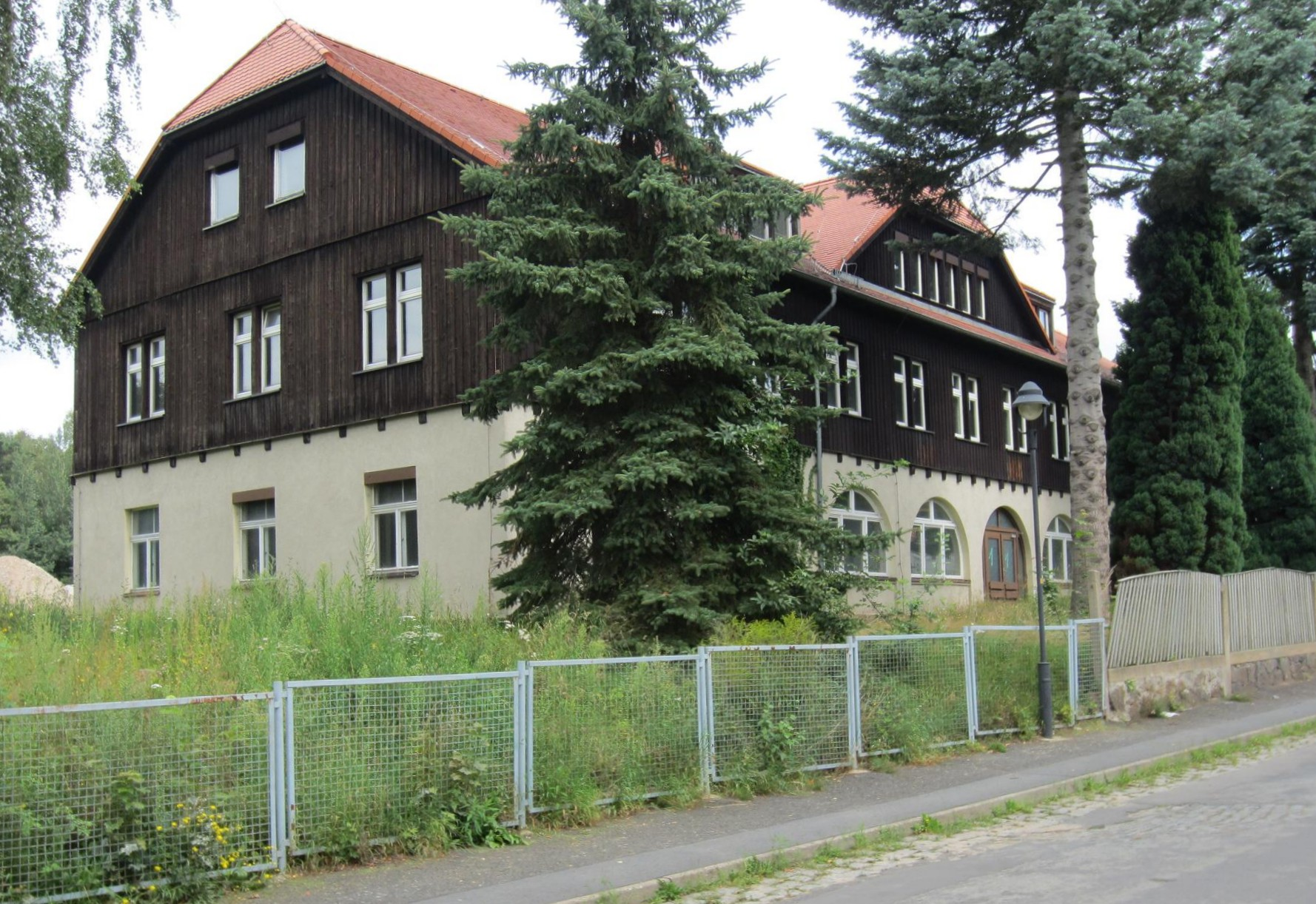 Denkmalgeschütztes Gebäude Karpatenstraße 18b in Rochwitz, Stadtteil von Dresden